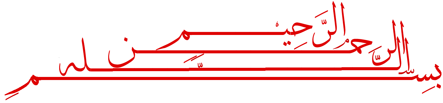 بسم الله الرحمن الرحيم | بسملة | ذكر | اسم الله